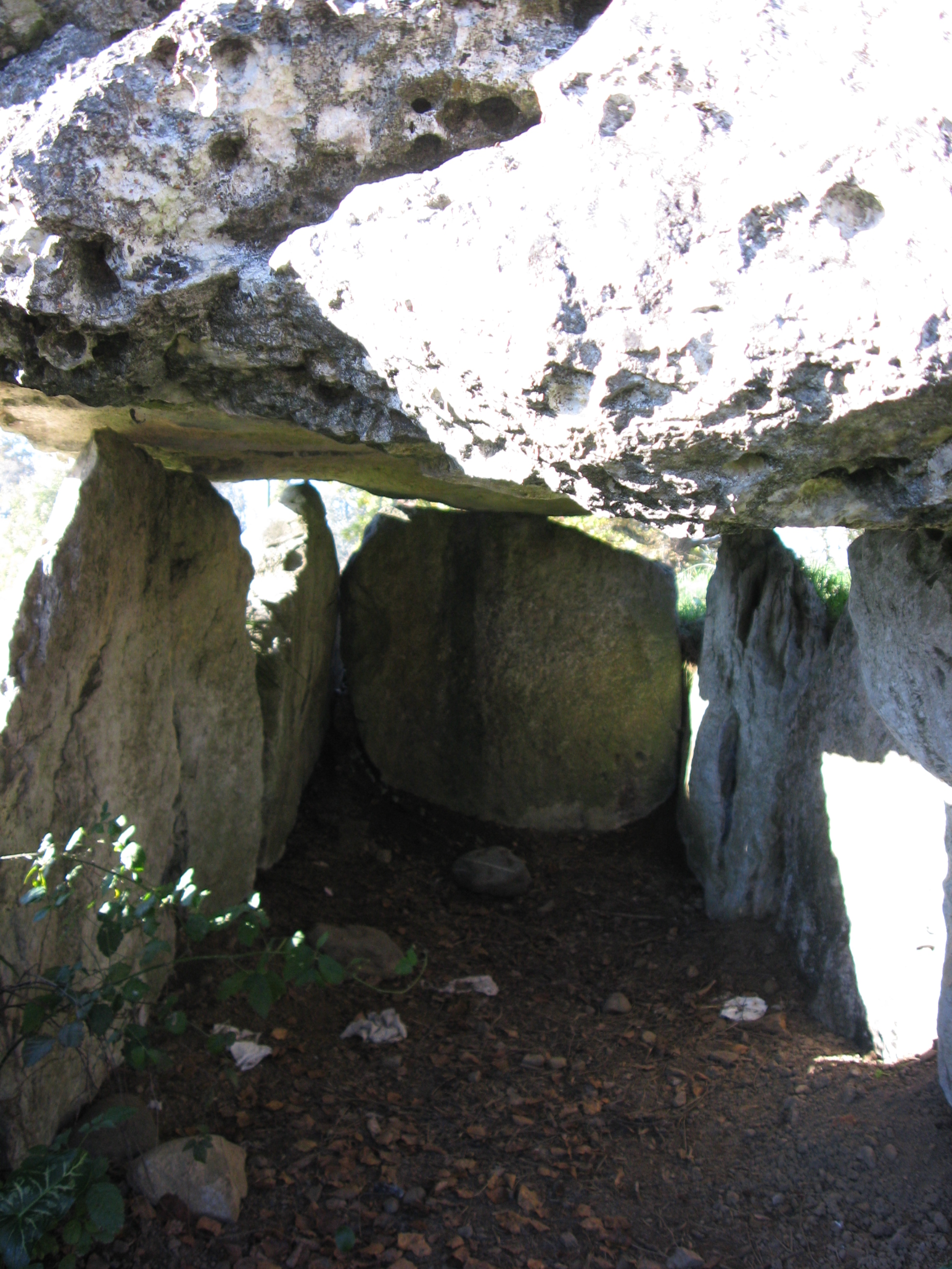 Vue intérieure du dolmen de Buzy (Pyrénées-Atlantiques) (Pyrénées).